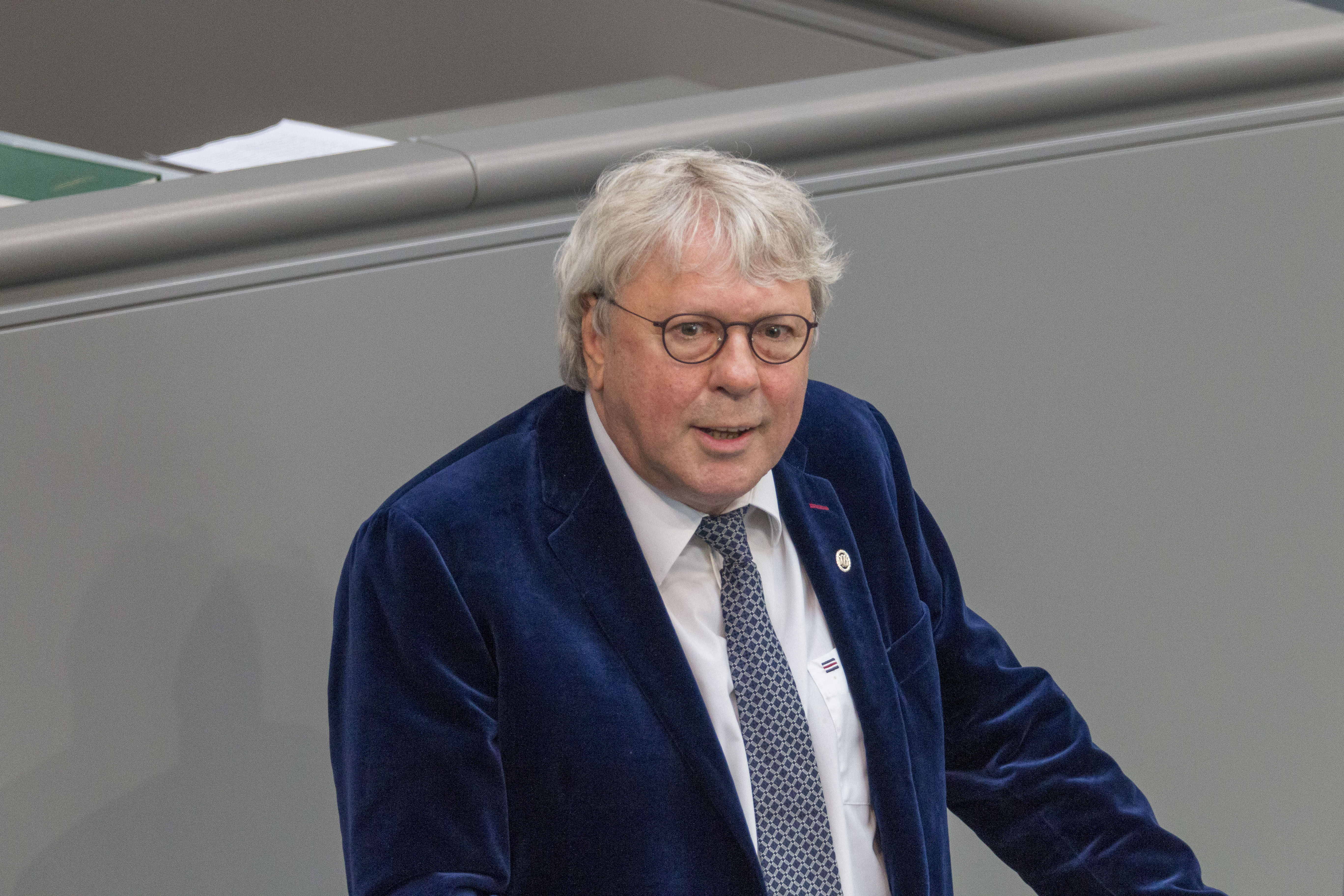 Uwe Schummer, Bundestagsabgeordneter der CDU während der Plenarsitzung des Deutschen Bundestages am 2. Juli 2020 in Berlin.